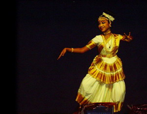 മോഹിനിയാട്ടം അവതരിപ്പിക്കുന്ന നർത്തകി. നൃത്തവേദിയിൽ നിന്നും പകർത്തിയത്.